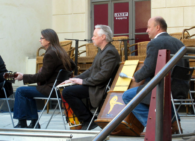 The Original Lapinlahden Linnut kuvaamassa materiaalia DVD-Videojulkaisua varten Helsingissä Perunatorilla Kaivopihan tuntumassa. Jäsenet kuvassa vasemmalta lukien: Veli-Pekka Oinonen, Hannu Lemola ja Markku Toikka.